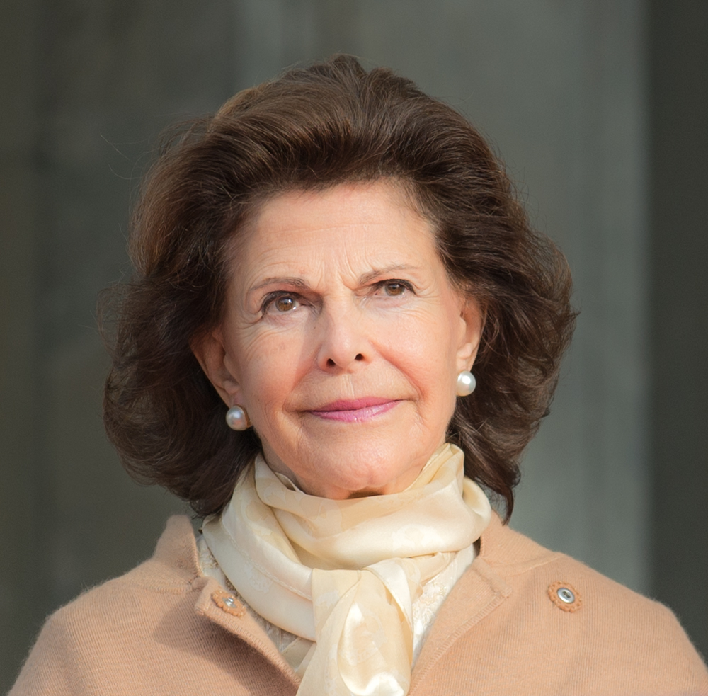 HM Drottningen under nyinvigningen av Nationalmuseum i Stockholm 2018 i närvaro av HM Konungen, HKH Kronprinsessan och HKH Prins Daniel, kulturminister Alice Bah Kuhnke, överintendent Susanna Pettersson.